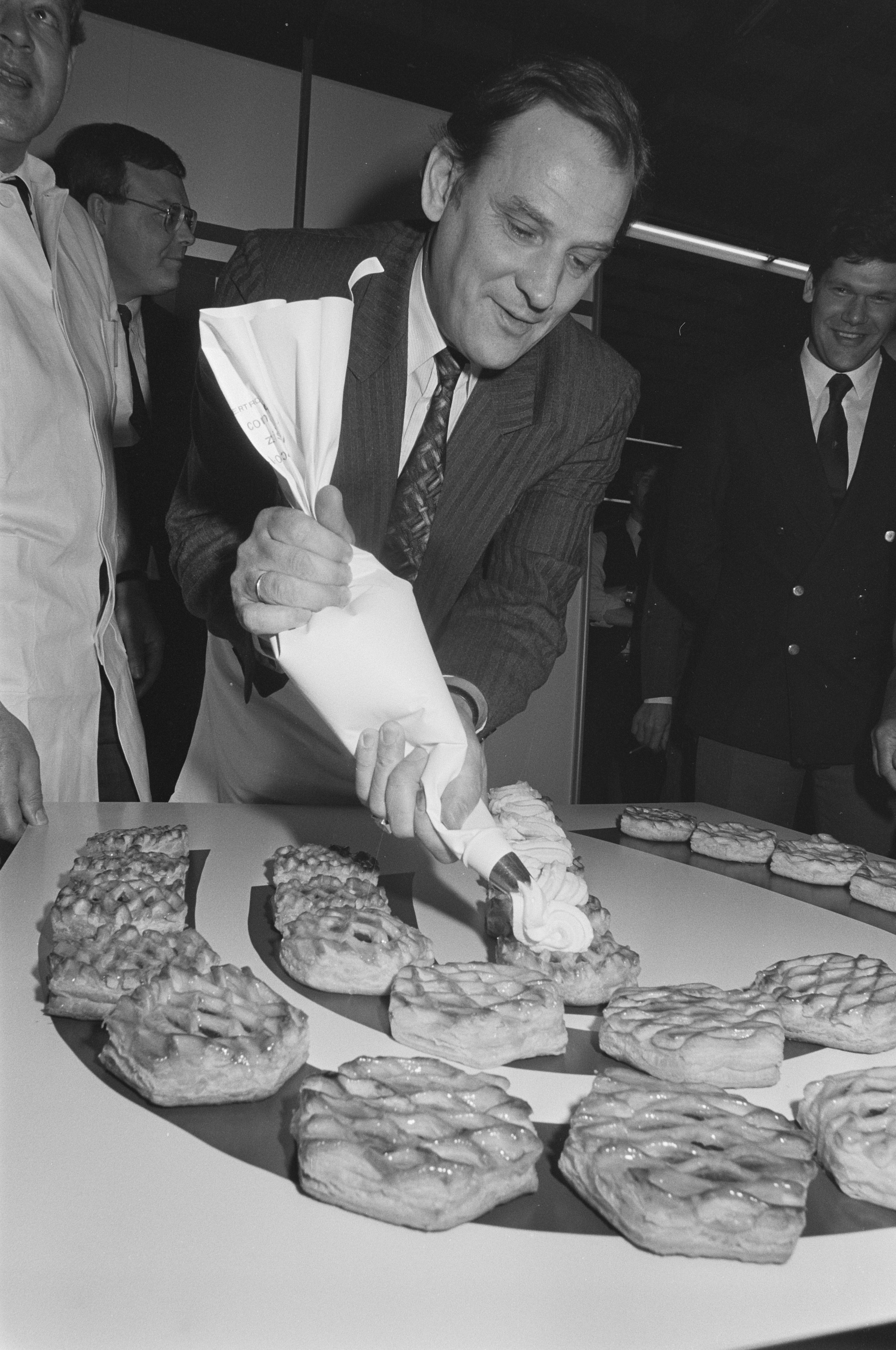 Collectie / Archief : Fotocollectie Anefo Reportage / Serie : [ onbekend ] Beschrijving : Staatssecretaris Albert-Jan Evenhuis opent Nebato Tech in Utrecht door gebakjes met slagroom te bespuiten Datum : 6 april 1987 Locatie : Utrecht (provincie), Utrecht (stad) Trefwoorden : openingen, staatssecretarissen Persoonsnaam : Evenhuis, A.J. Fotograaf : Bogaerts, Rob / Anefo, [onbekend] Auteursrechthebbende : Nationaal Archief Materiaalsoort : Negatief (zwart/wit) Nummer archiefinventaris : bekijk toegang 2.24.01.05 Bestanddeelnummer : 933-9445